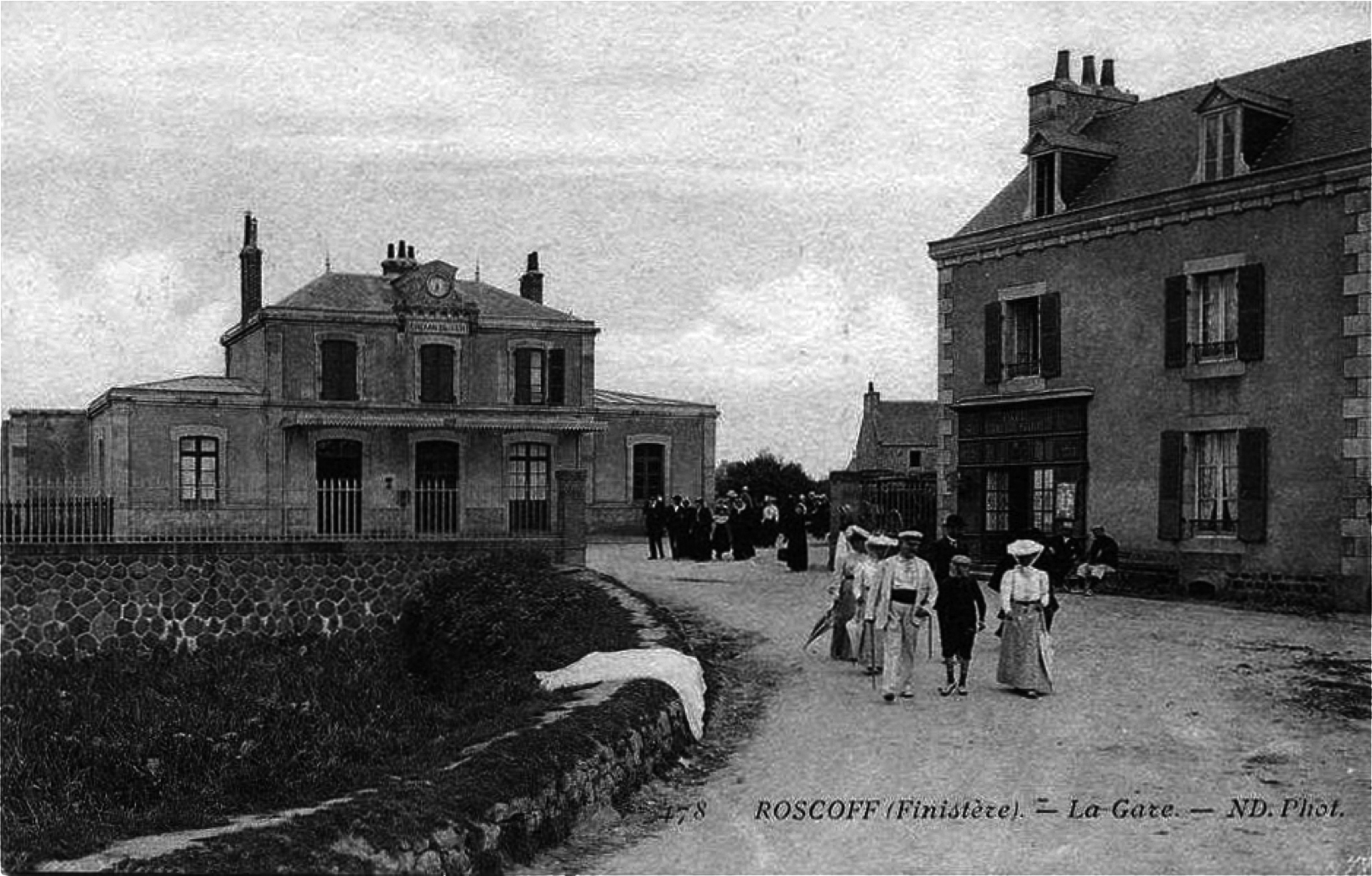 L'extérieur de la gare de Roscoff, avec le bâtiment voyageurs et la cour de la gare.